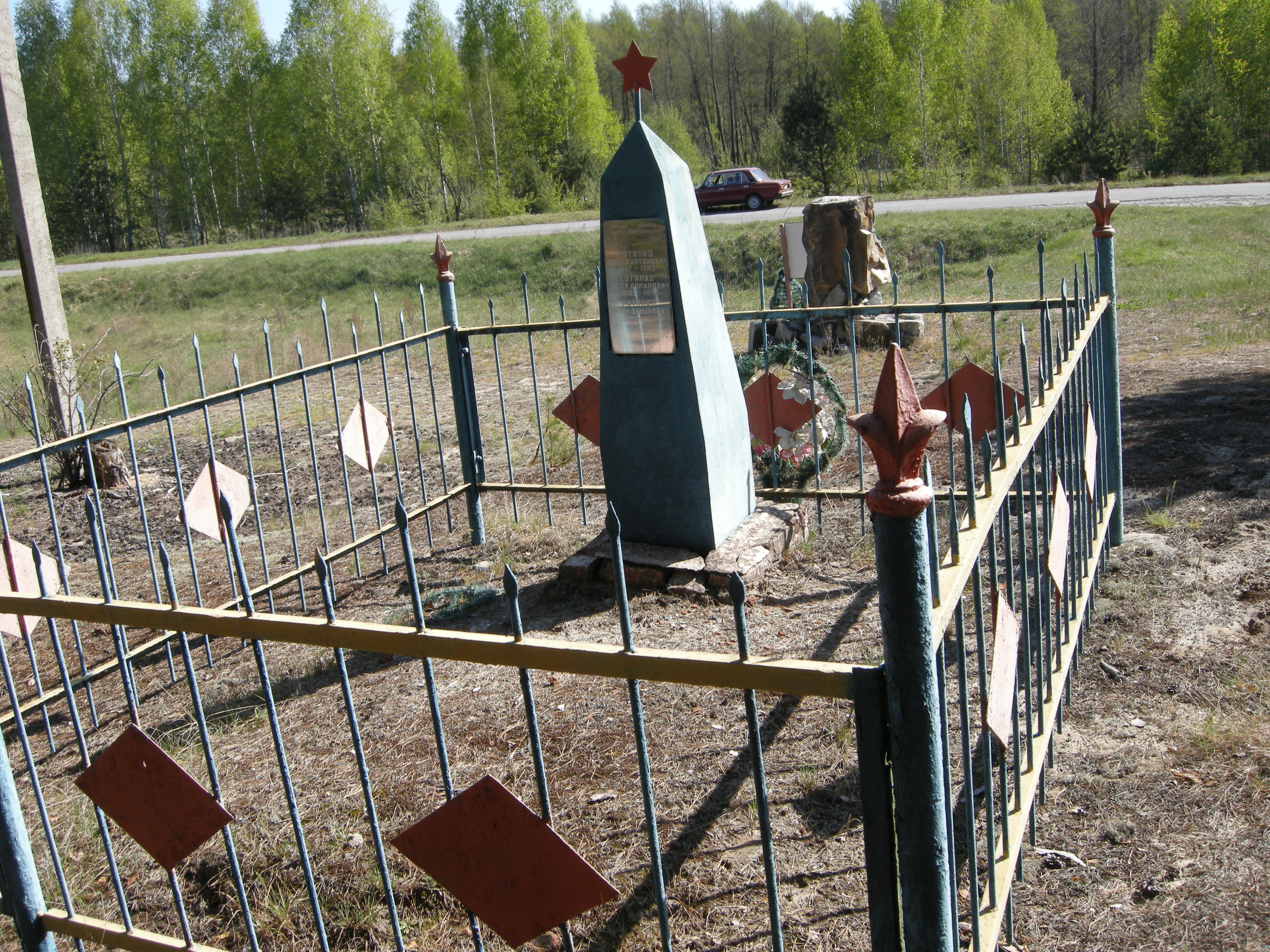 могили на місці хутора Каплиця